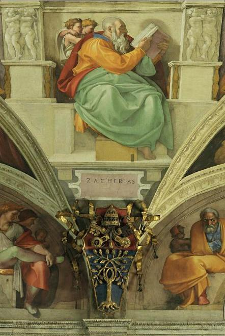 Na parede acima da porta principal de entrada da Capela Sistina o afresco do Profeta menor Zacarias, em cujo rosto foi pintado a face do Papa Júlio II, o mecena da pintura. Abaixo de Zacarias o brasão do mesmo papa com as armas da Casa Della Rovere. Autoria de Michelangelo.